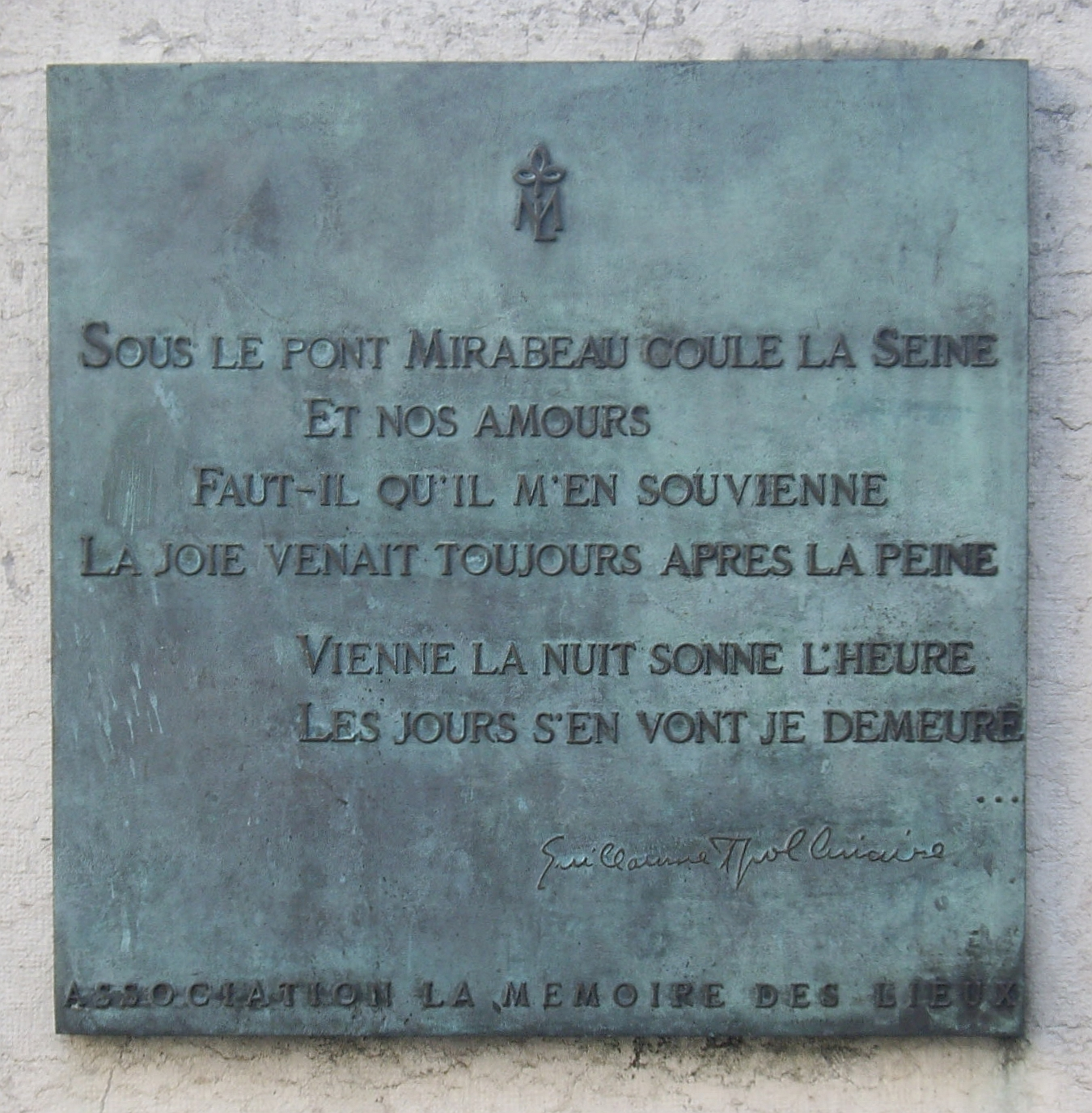 Plaque apposée sur la paroi du pont Mirabeau donnant sur le quai Louis-Blériot, Paris 16e. Premiers vers du poème de Guillaume Apollinaire Le Pont Mirabeau paru dans Alcools en 1913 :Sous le pont Mirabeau coule la Seine Et nos amours Faut-il qu’il m’en souvienneLa joie venait toujours après la peine Vienne la nuit sonne l’heure Les jours s’en vont je demeure[Signature] Guillaume Apollinaire